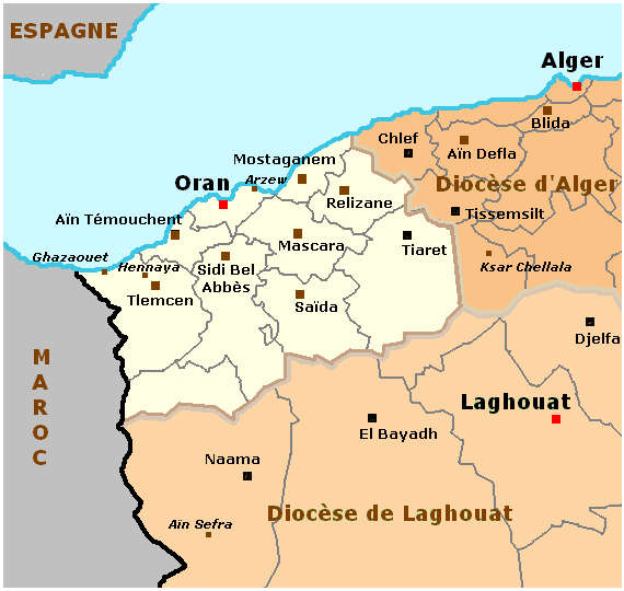 Localisation du diocèse catholique d'Oran, Algérie.